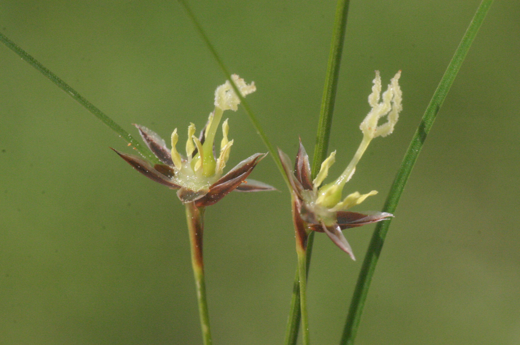 Juncus monanthos (Einblüten-Simse) Blüten Aufnahmeort: Hochschwab, Steiermark, Austria